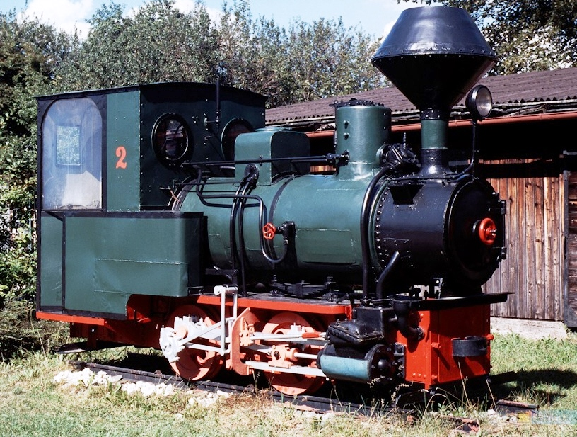 Exponat im Eisenbahnmuseum Nördlingen